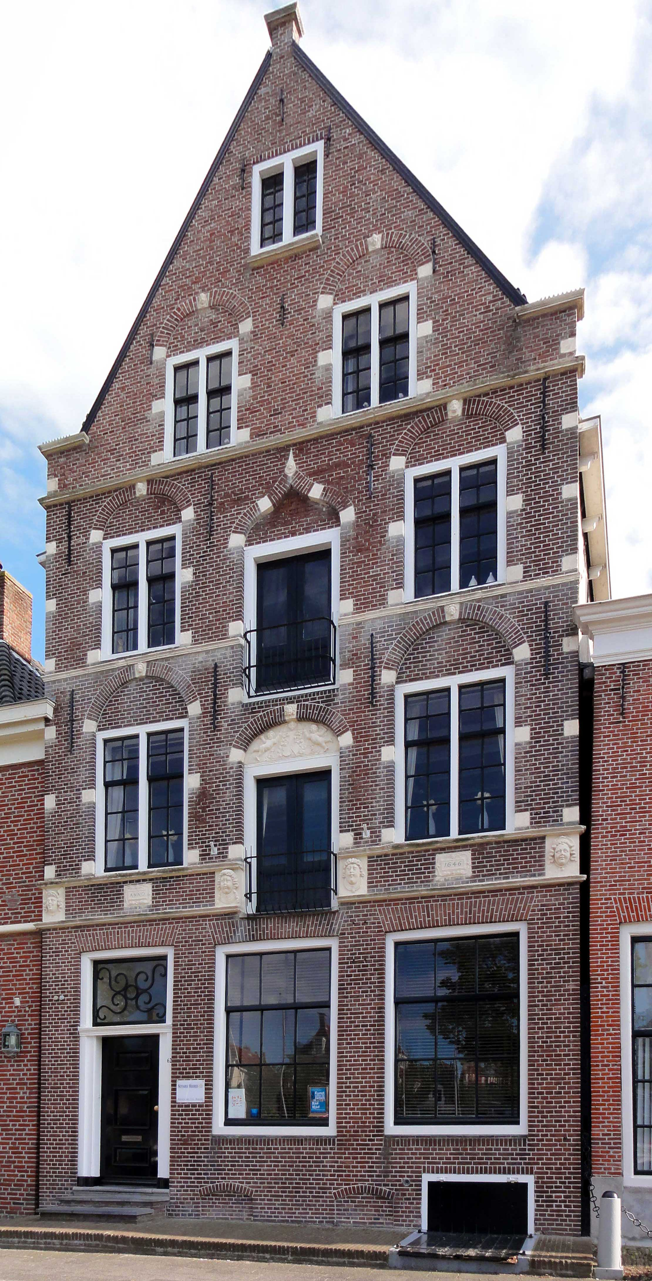 Noorderhaven 62 in Harlingen